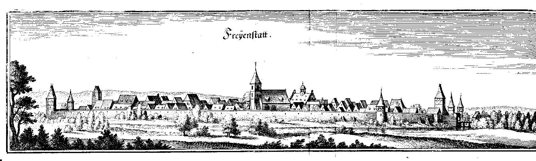 Freystadt in der Oberpfalz (Kupferstich Merian) im 17. Jhdt.